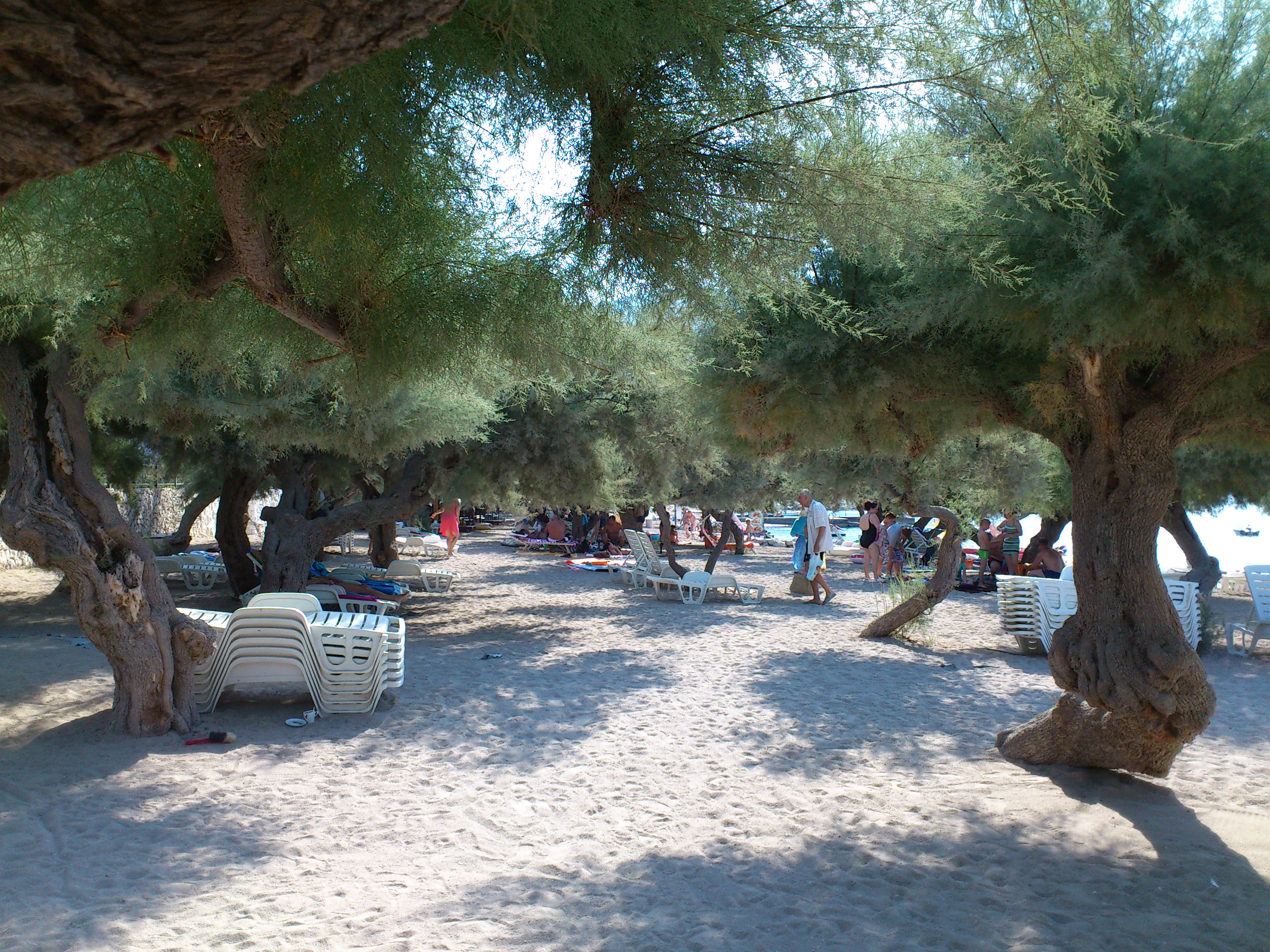 Omis